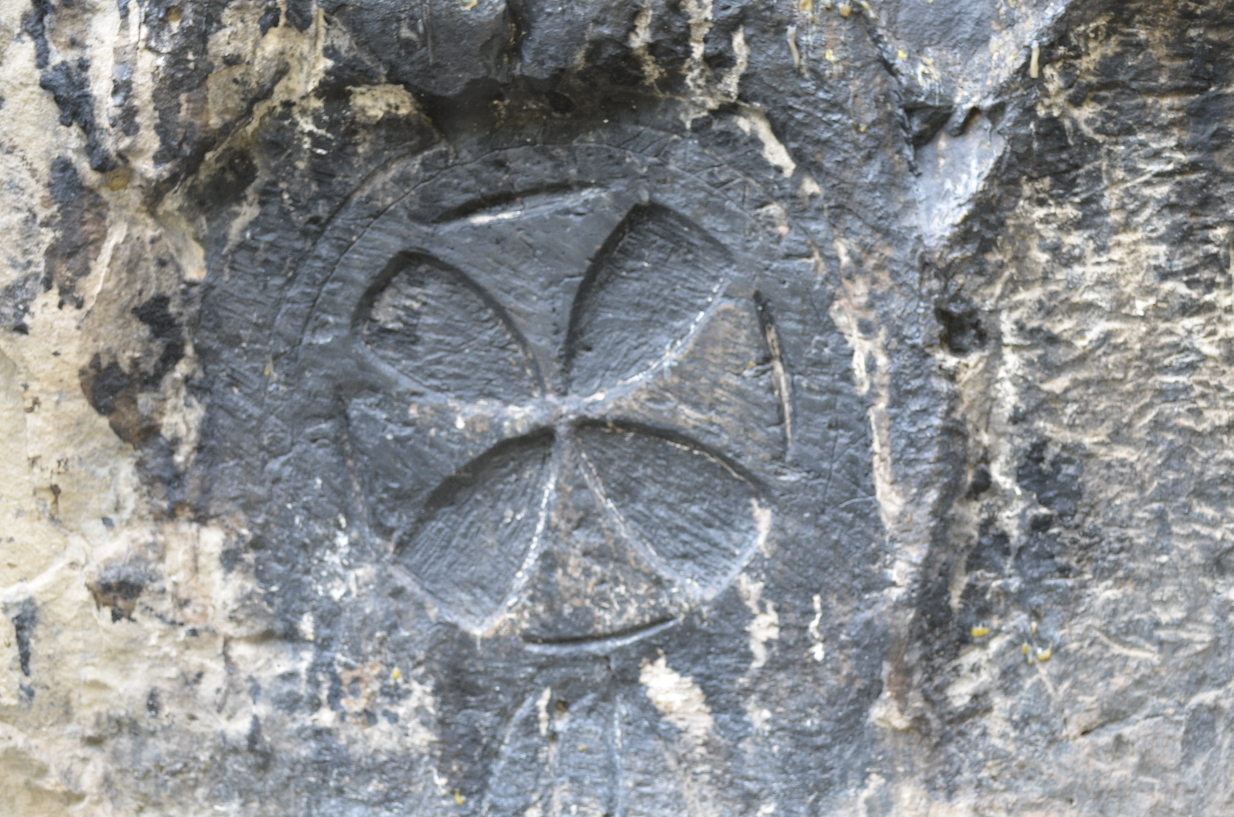 კაცხის სვეტი - ეკლესია ნახევრადგამოქვაბული